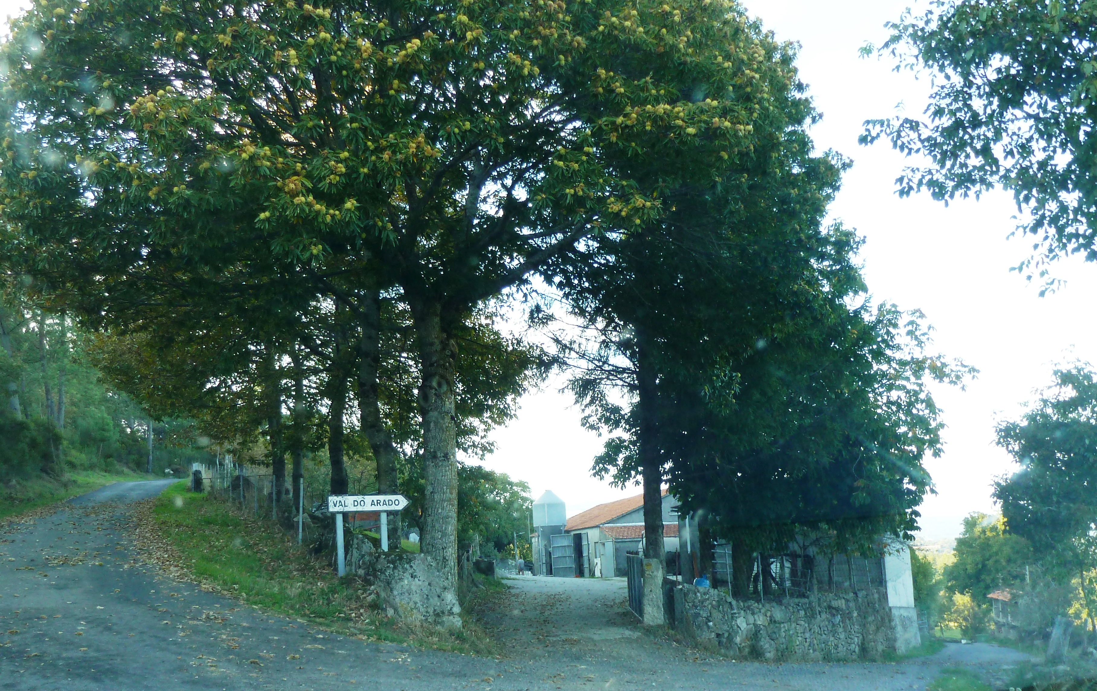 Val do Arado, Furco, Carballedo